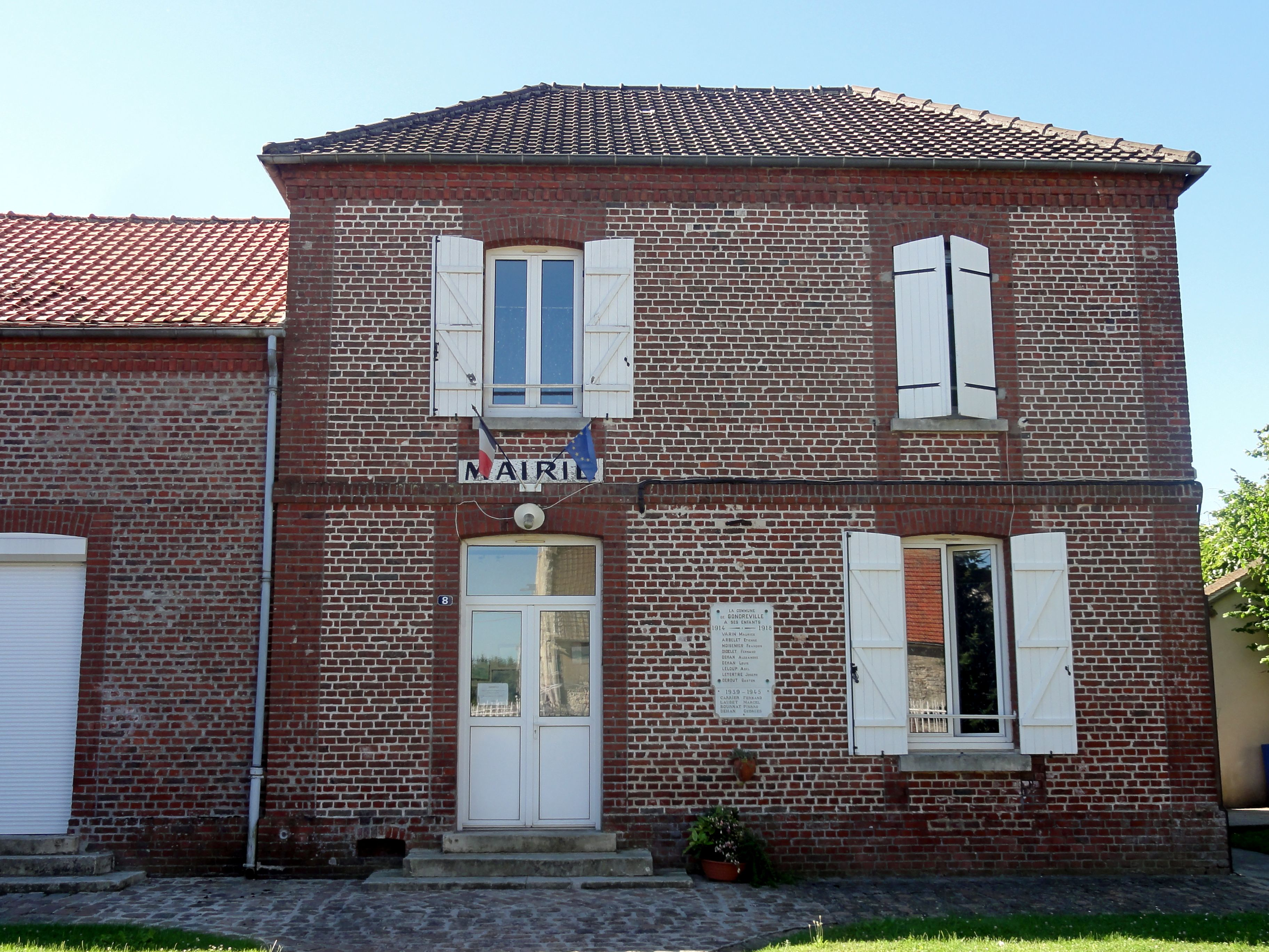 La mairie, rue de l'École.